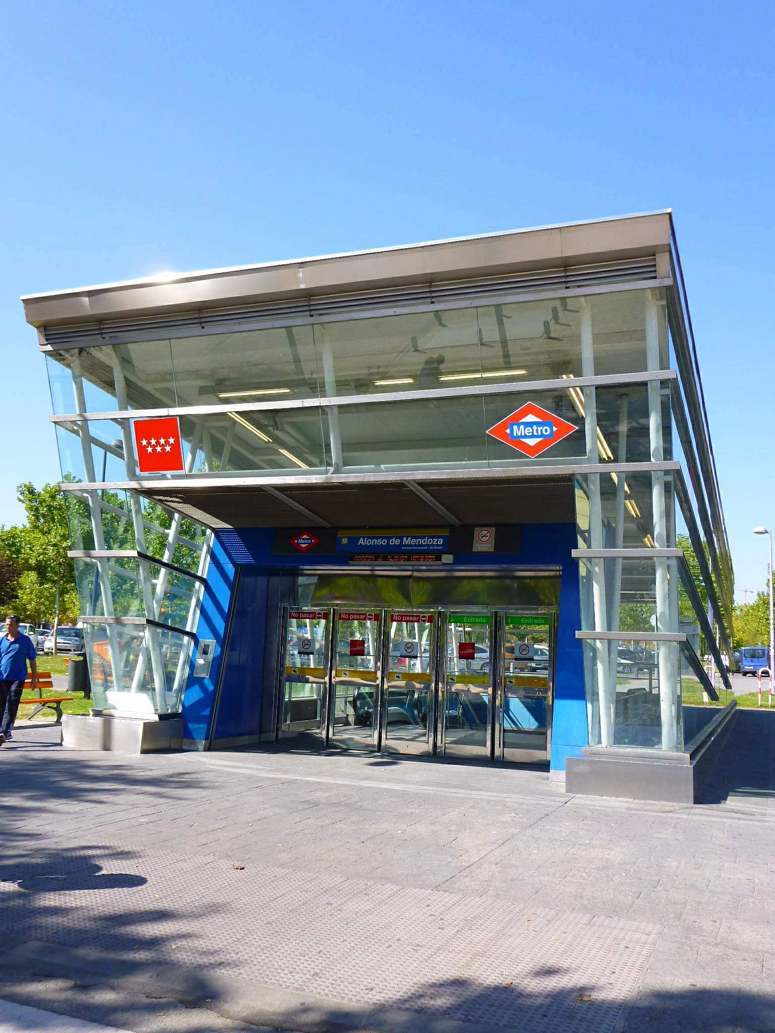 Getafe (Madrid)